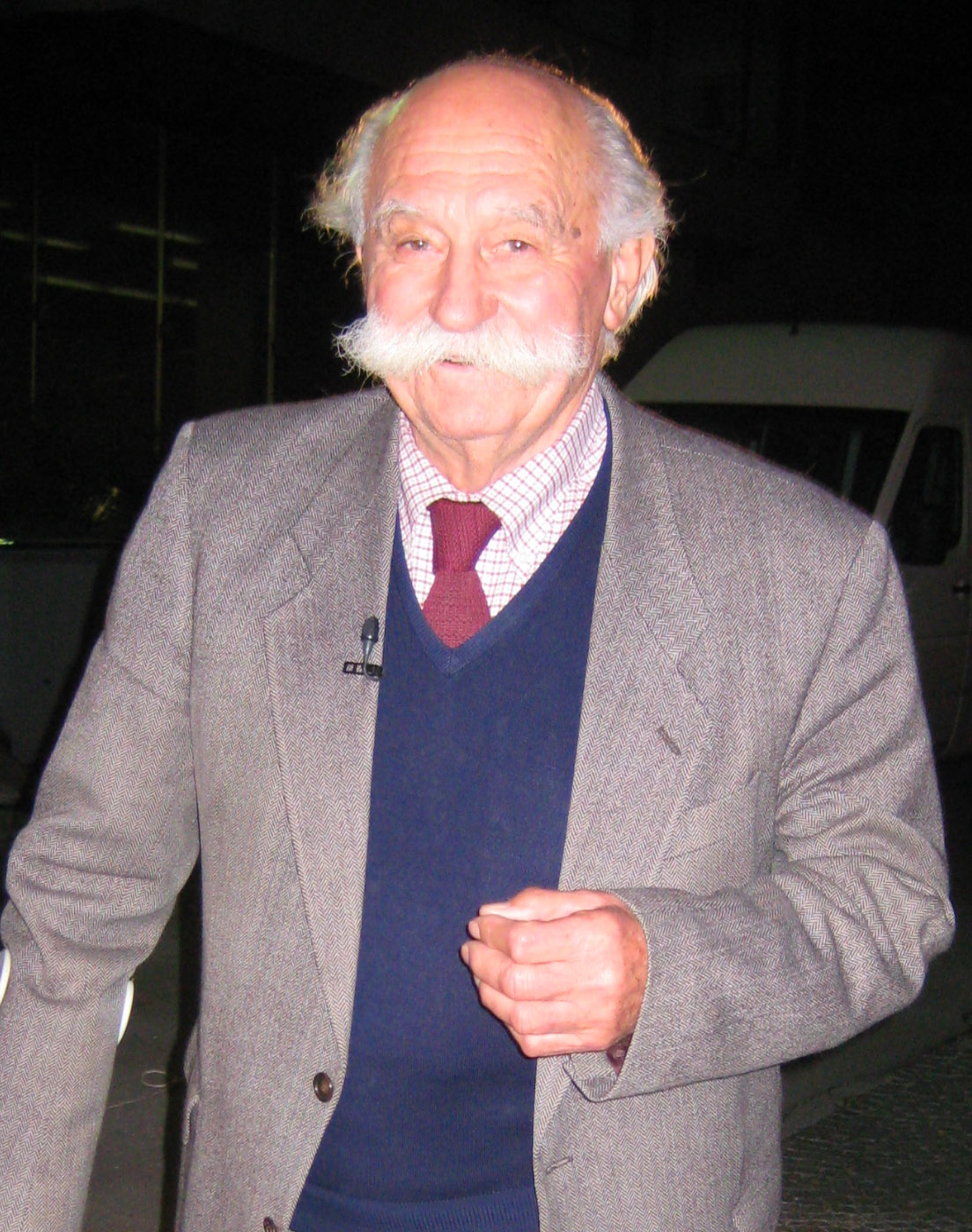 Janez Stanovnik, slovenian politic and partisan (WW2)